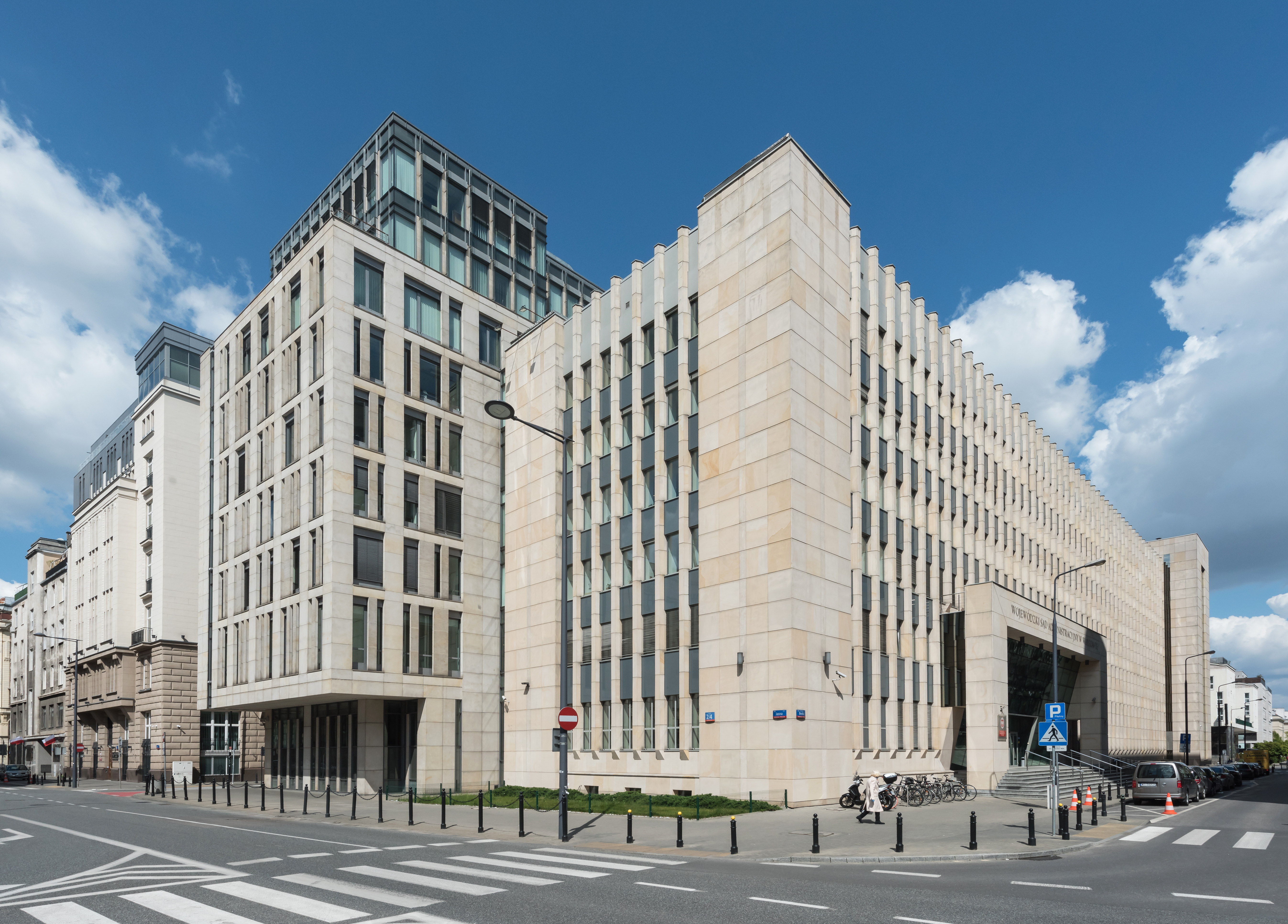 Kompleks Naczelnego Sądu Administracyjnego (z lewej) i Wojewódzkiego Sądu Administracyjnego (z prawej) w Warszawie przy ul. Boduena 3/5, widok od strony ul. Jasnej